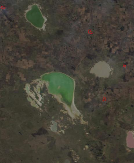 озеро Селетытениз, Северный Казахстан